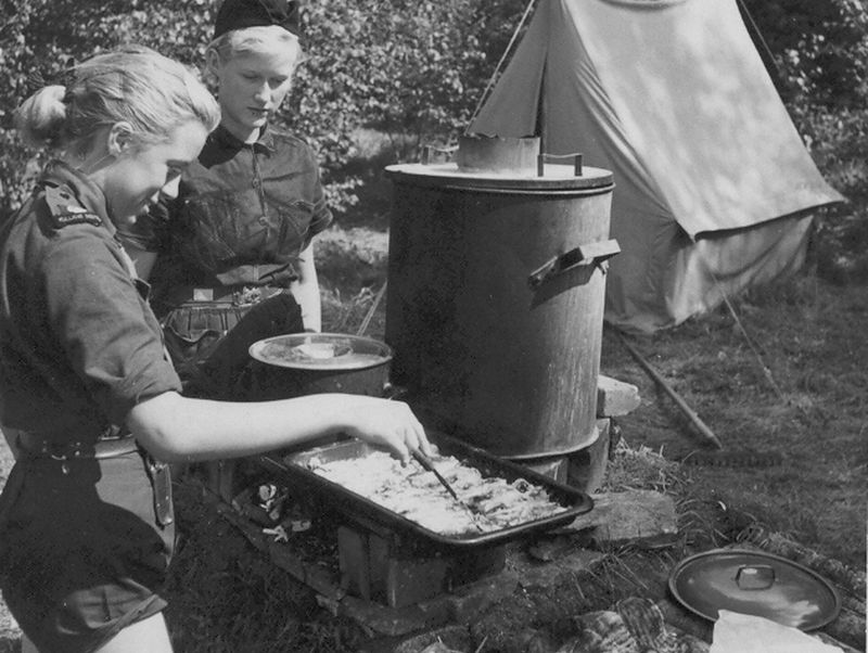 Strömmingsstekning på läger, SFS, 50-tal